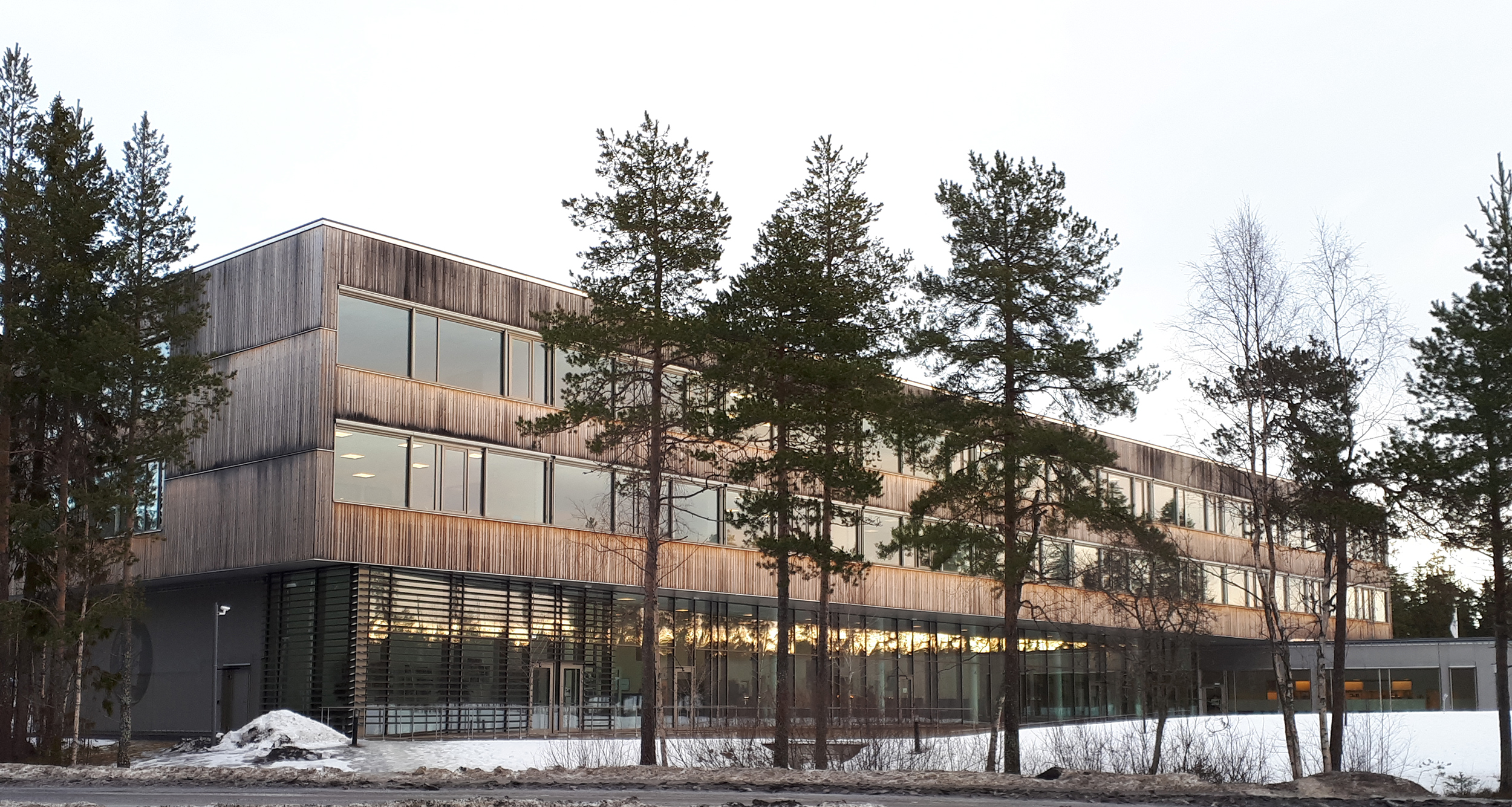 Minerva gymnasium i Umeå, exteriör mot söder.